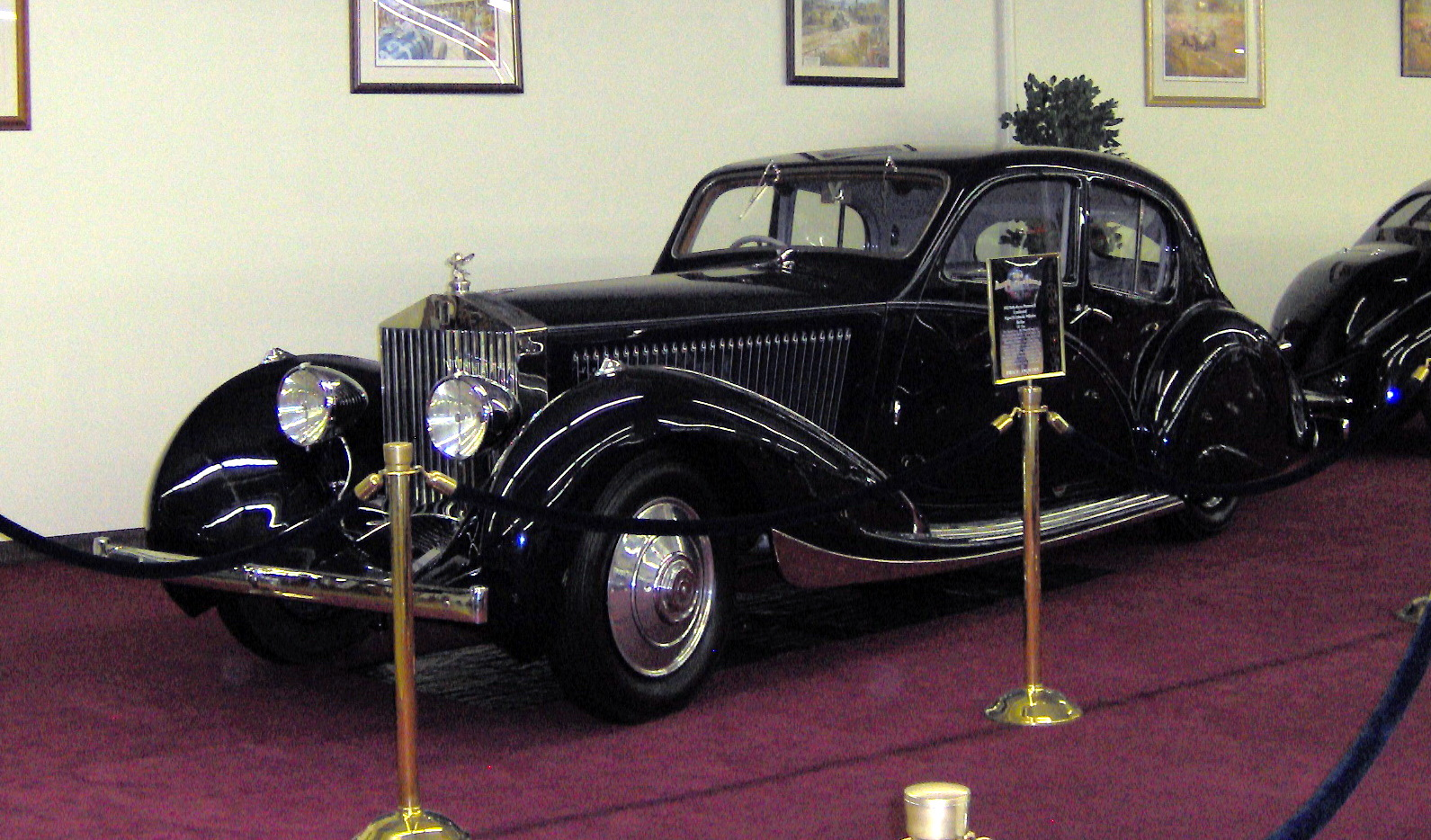 1932 Rolls-Royce Phantom II Continental Figoni et Falaschi Pillarless Berline